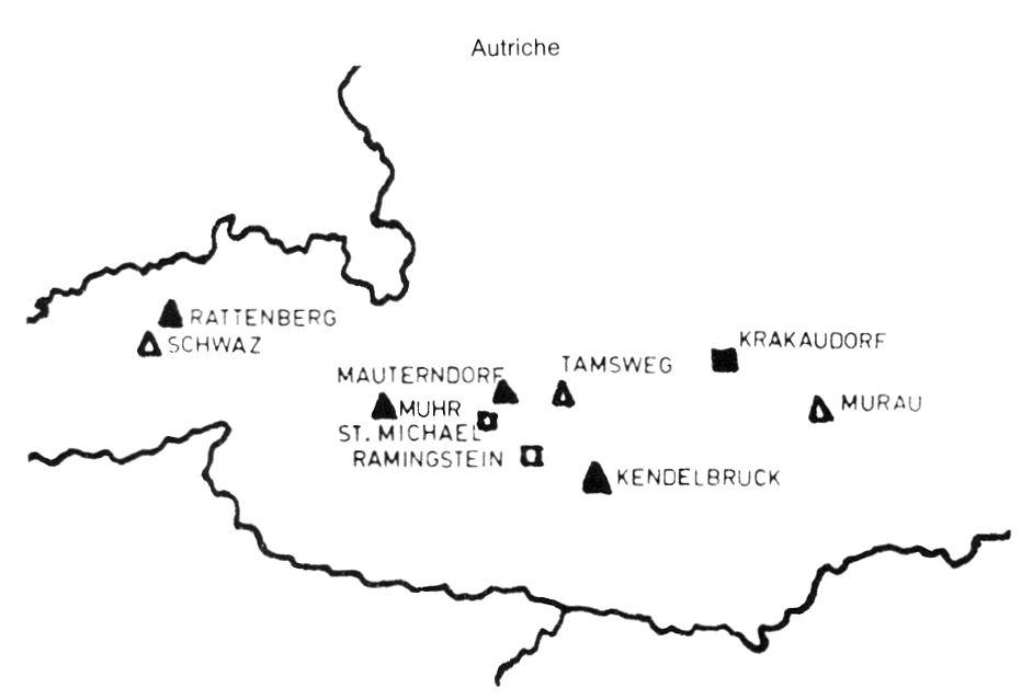 répartition des Sansons en Autriche